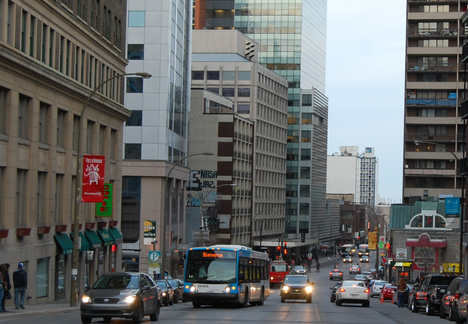 Rue Guy, vue du chemin de la Côte-des-Neiges, au nord de la rue Sherbrooke, Montréal